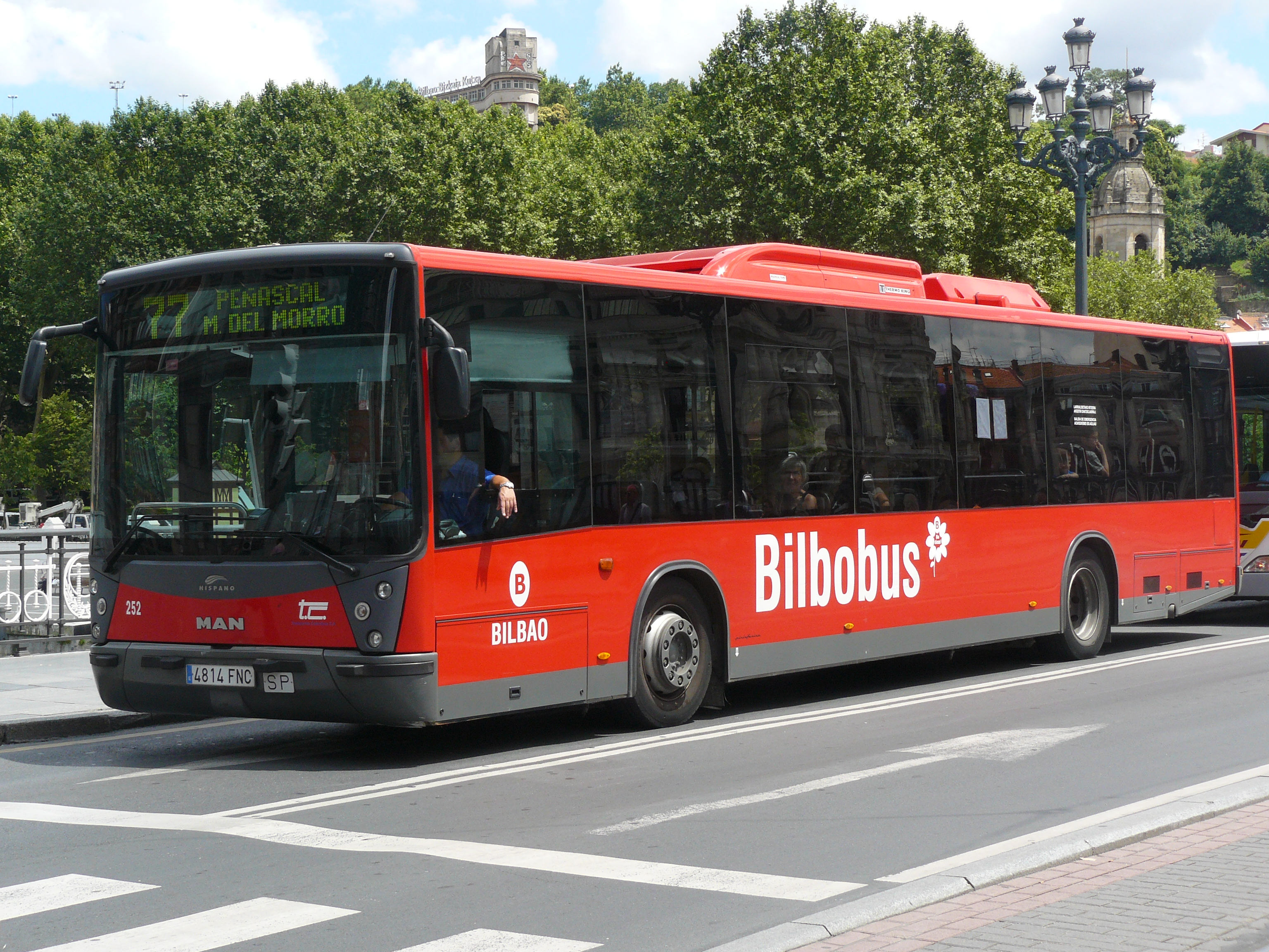 Un autobús de BilboBus, de Bilbao, España.